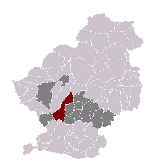 Dechy dans son canton et son arrondissement